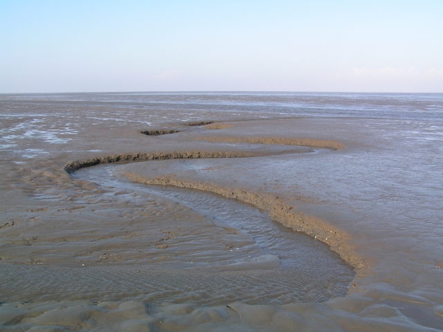 Muddy tidal flat in NP Schleswig-Holsteinisches Wattenmeer, Germany Author: M.Buschmann